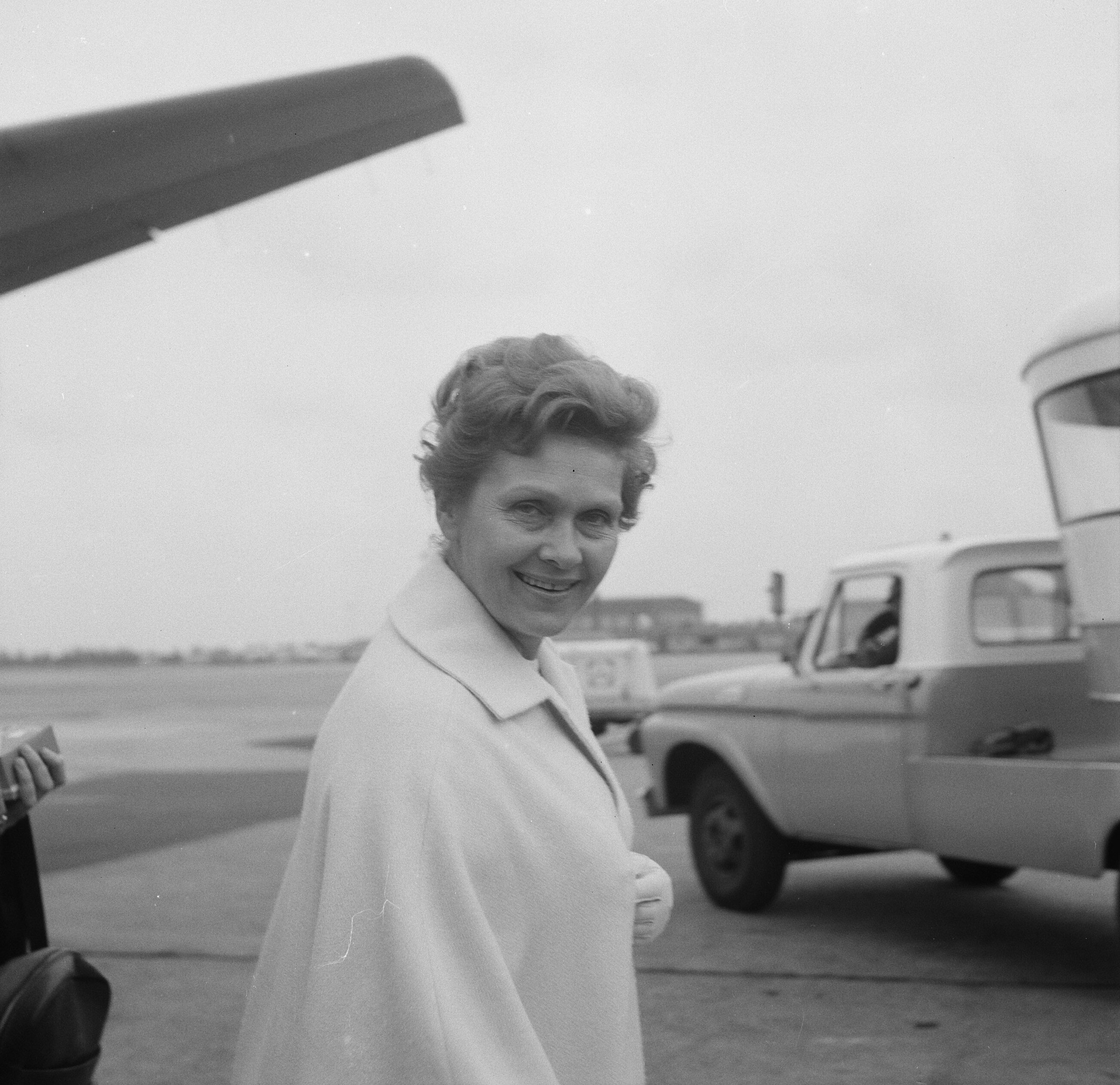 Collectie / Archief : Fotocollectie Anefo Reportage / Serie : [ onbekend ] Beschrijving : Aankomst Elisabeth Schwartzkopf (zangeres) op Schiphol Elisabeth Schwartzkopf (kop) Datum : 23 juni 1964 Locatie : Noord-Holland, Schiphol Trefwoorden : KOPPEN, aankomsten, zangeressen Persoonsnaam : Elisabeth Schwartzkopf Fotograaf : Gelderen, Hugo van / Anefo Auteursrechthebbende : Nationaal Archief Materiaalsoort : Negatief (zwart/wit) Nummer archiefinventaris : bekijk toegang 2.24.01.03 Bestanddeelnummer : 916-5691